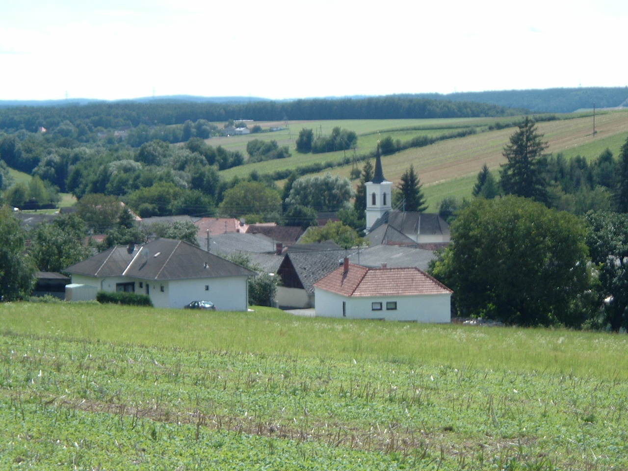 Rumpersdorf, Burgenland, Austria